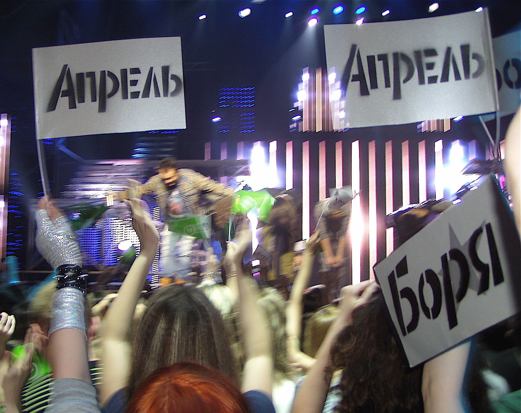 Фани Б. Апрєля на концерті "Суперфіналу".